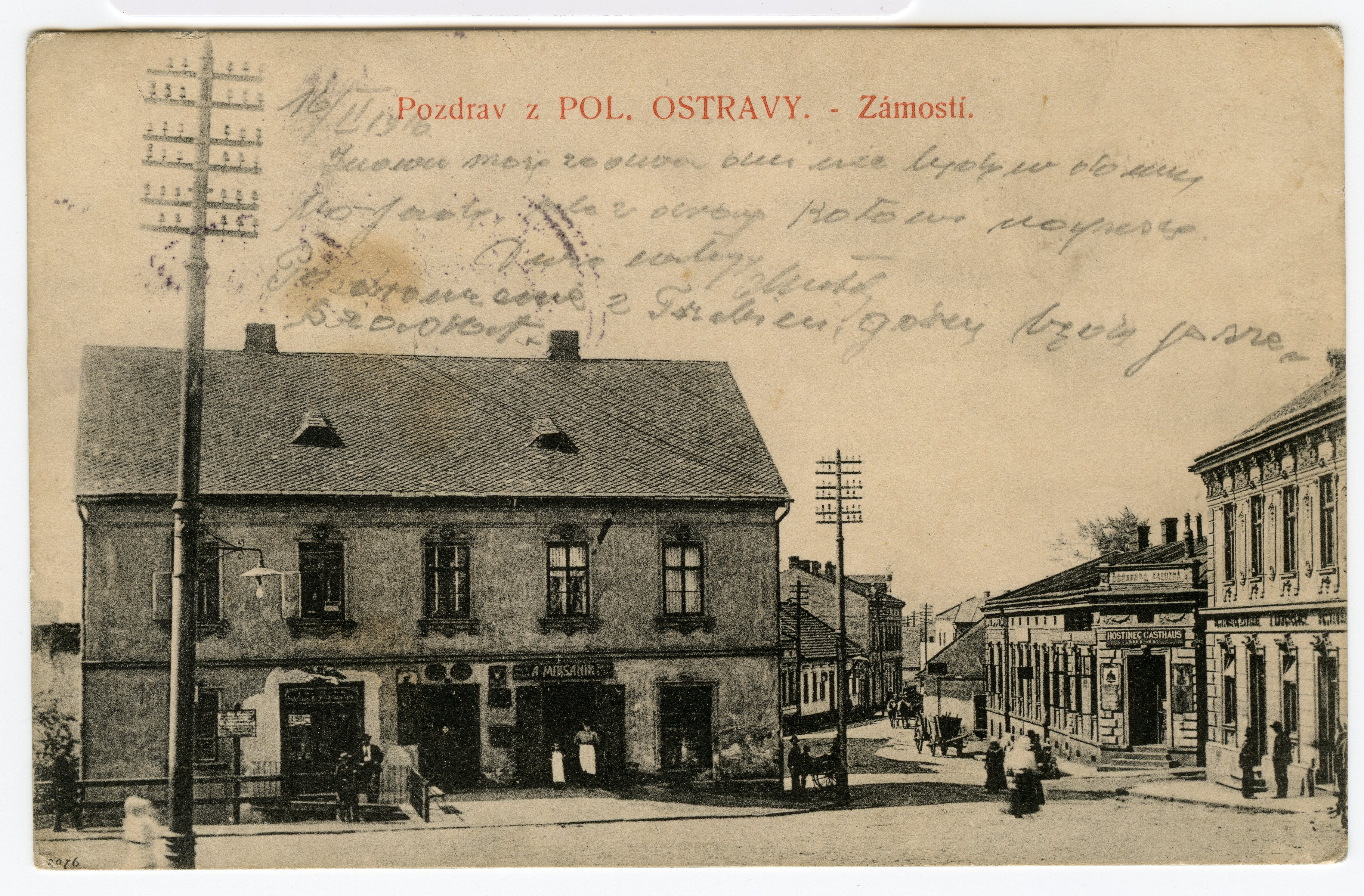 Pocztówka z obiegu, napisana 16 II 1916 r. (data na datowniku pocztowym nieczytelna). Av.: "Pozdrav z POL. OSTRAVY. – Zámostí", Rv. „Nakl Jan Pekarský Pol. Ostrava." Zbiór prywatny Roberta Pieńkowskiego z Wrocławia.